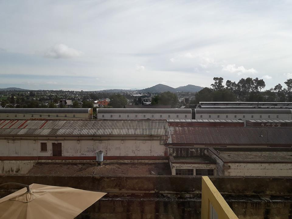 Estación de tren Apizaco